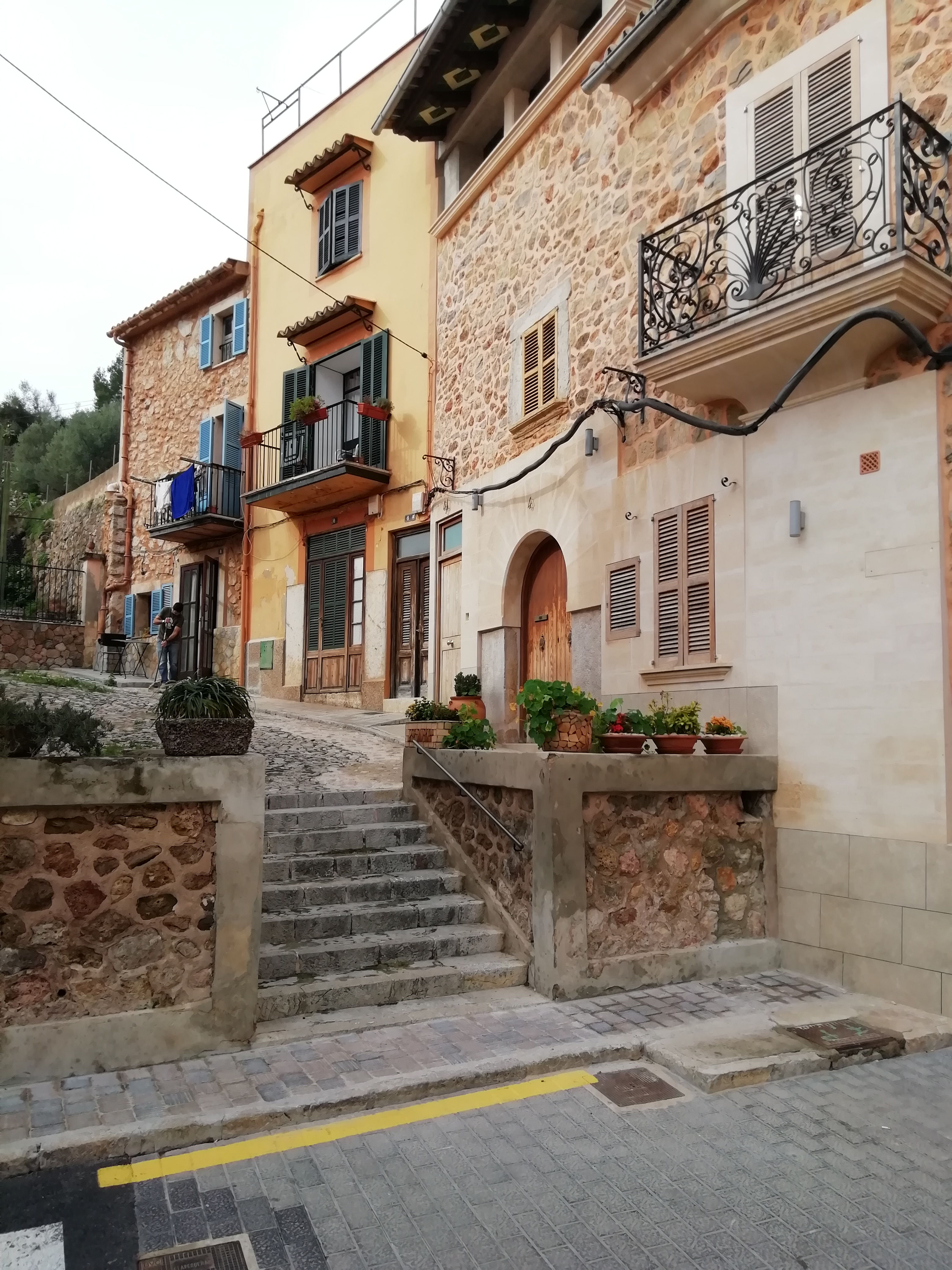 Bunyola, Mallorca.